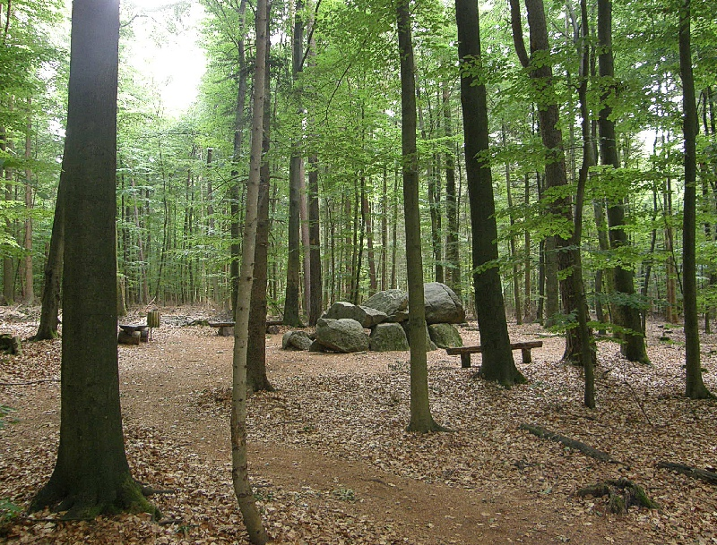 Bilder aus Lamstedt